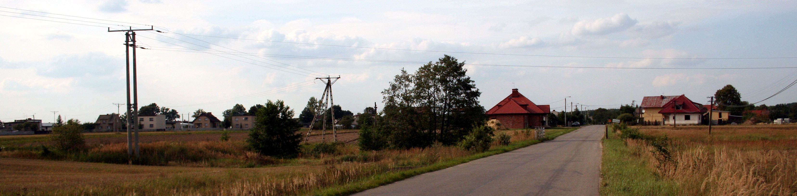 Chowstek, powiat lubliniecki, widok wsi od strony południowej